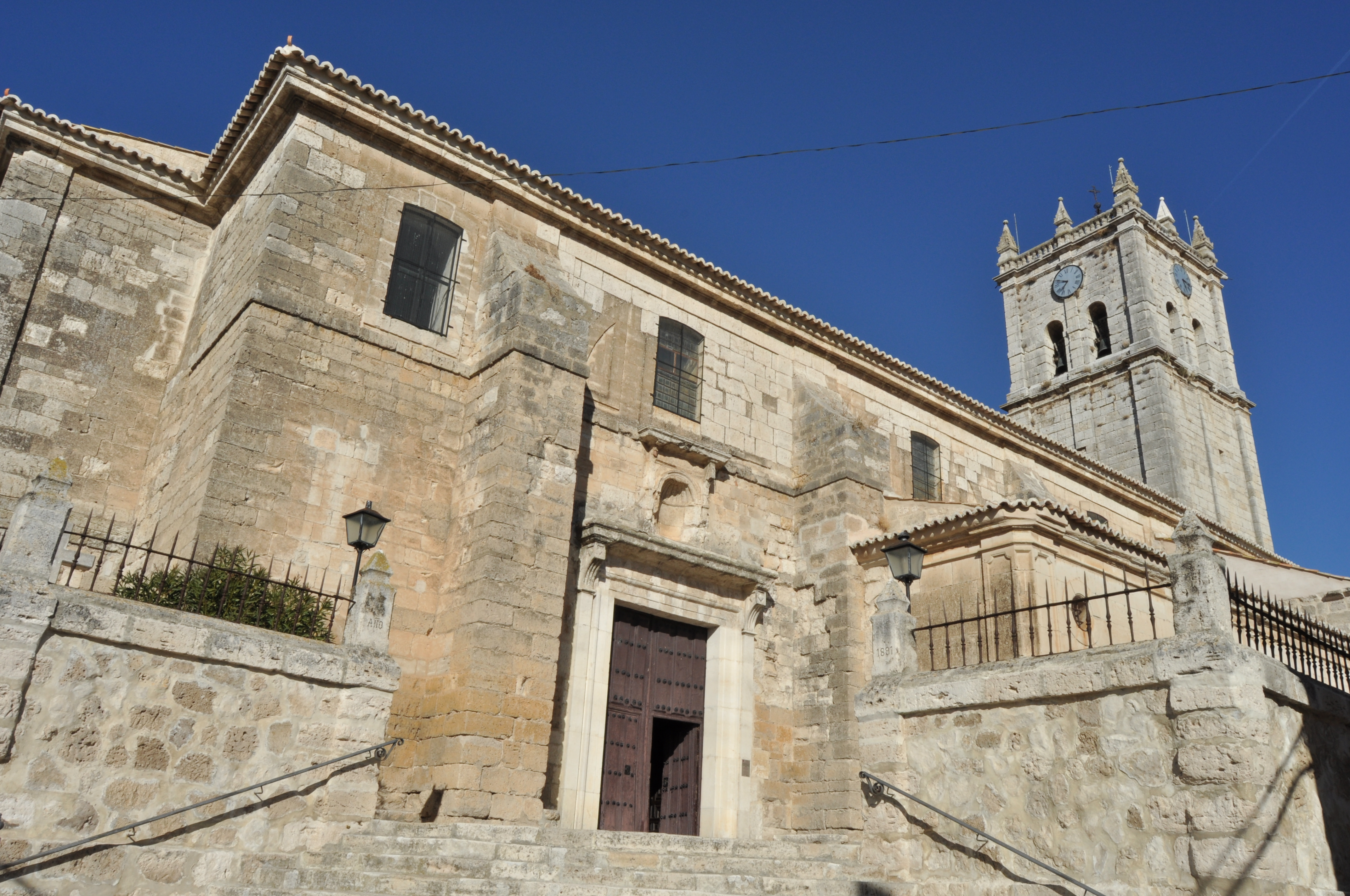 Baltanas - 026